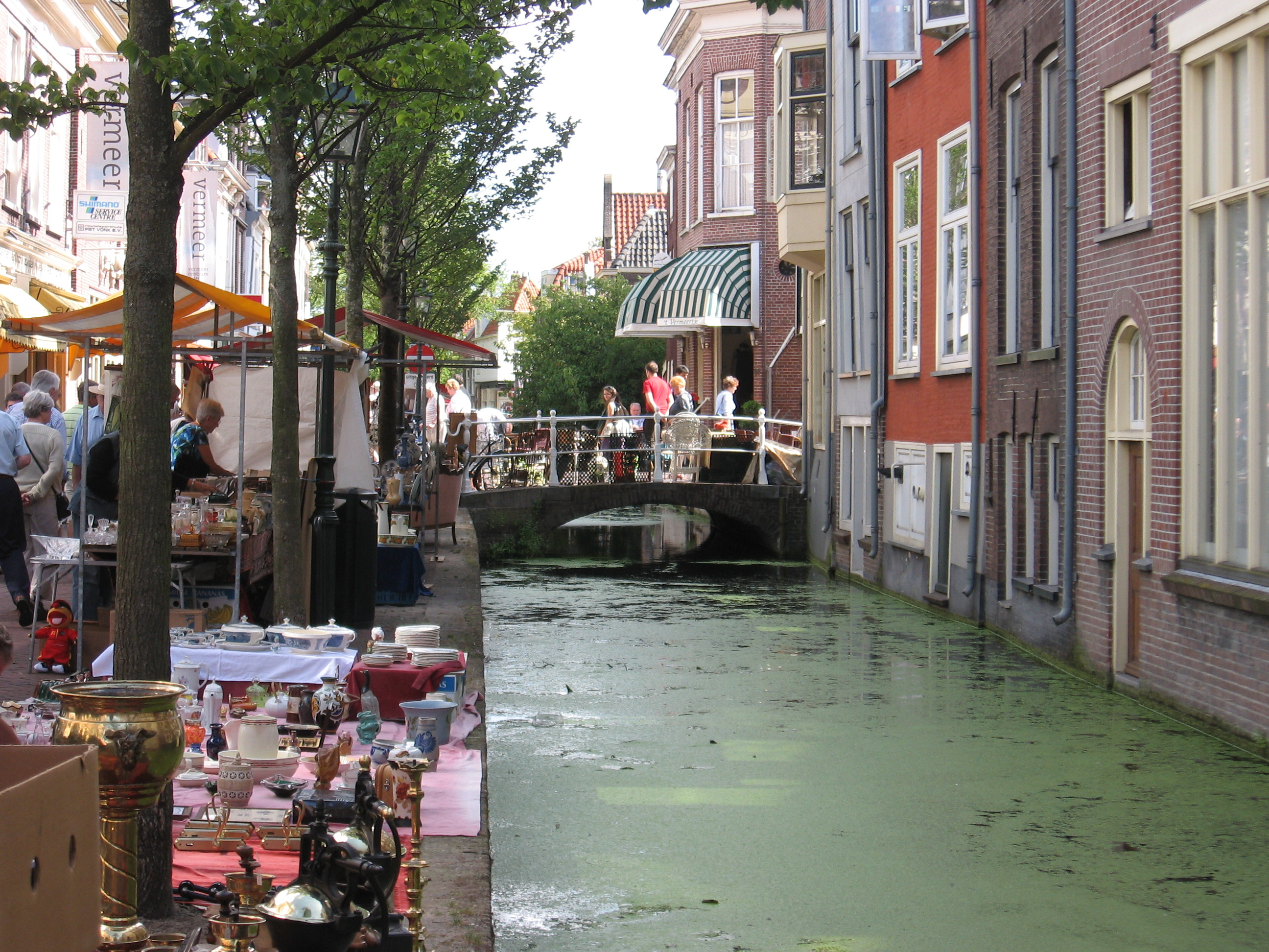 Delft - Oudemanhuisbrug Voldersgracht.jpg